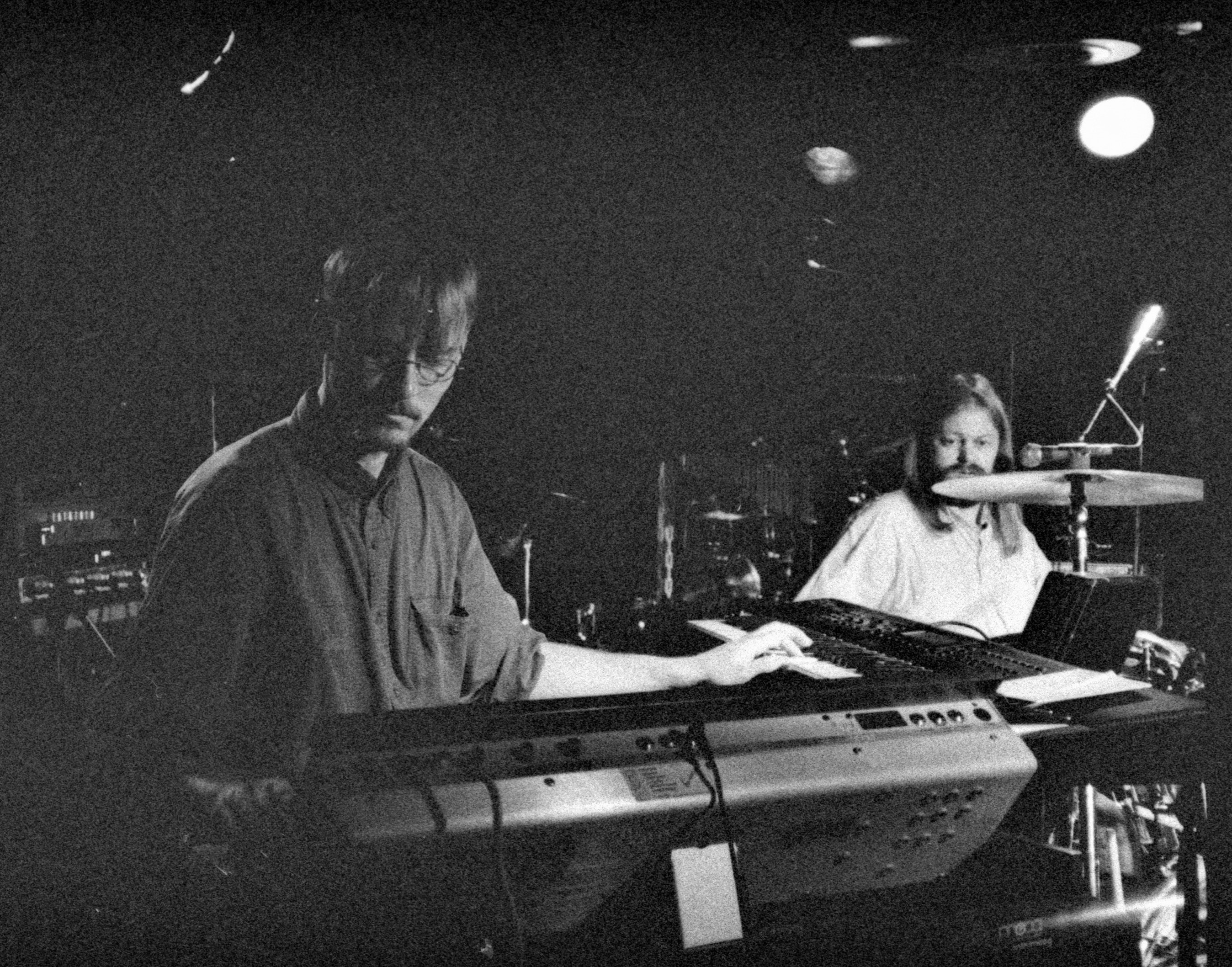 Konsertbilde FRUITCAKE ca. 1999